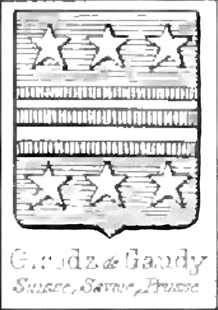 Wappen derer Girodz de Gaudy (Girodz von Gaudi) (Schweiz, Savoyen, Preußen)